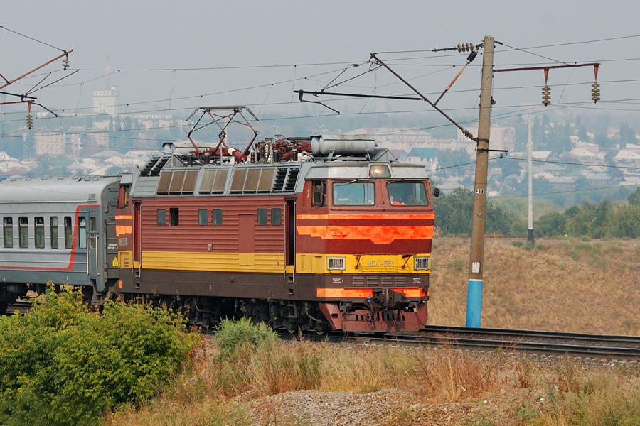 Электровоз ЧС4Т-551 с пассажирским поездом, перегон Лиски - Пухово Ю-ВОСТ ЖД